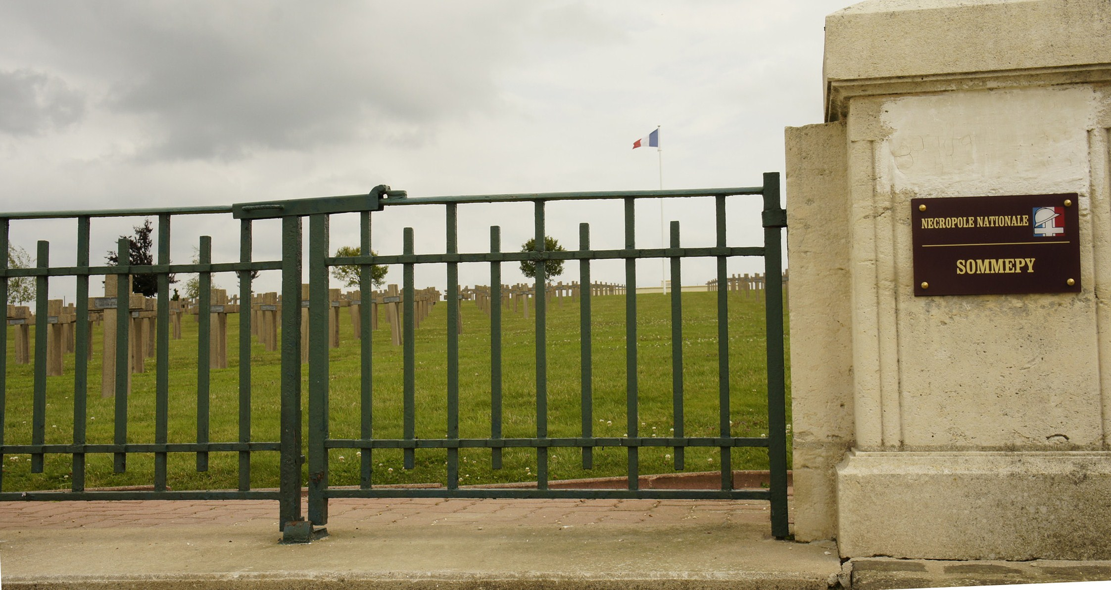 entrée de la nécropole nationale de Sommepy Tahure ayant recueilli 2 201 corps de combattants français.